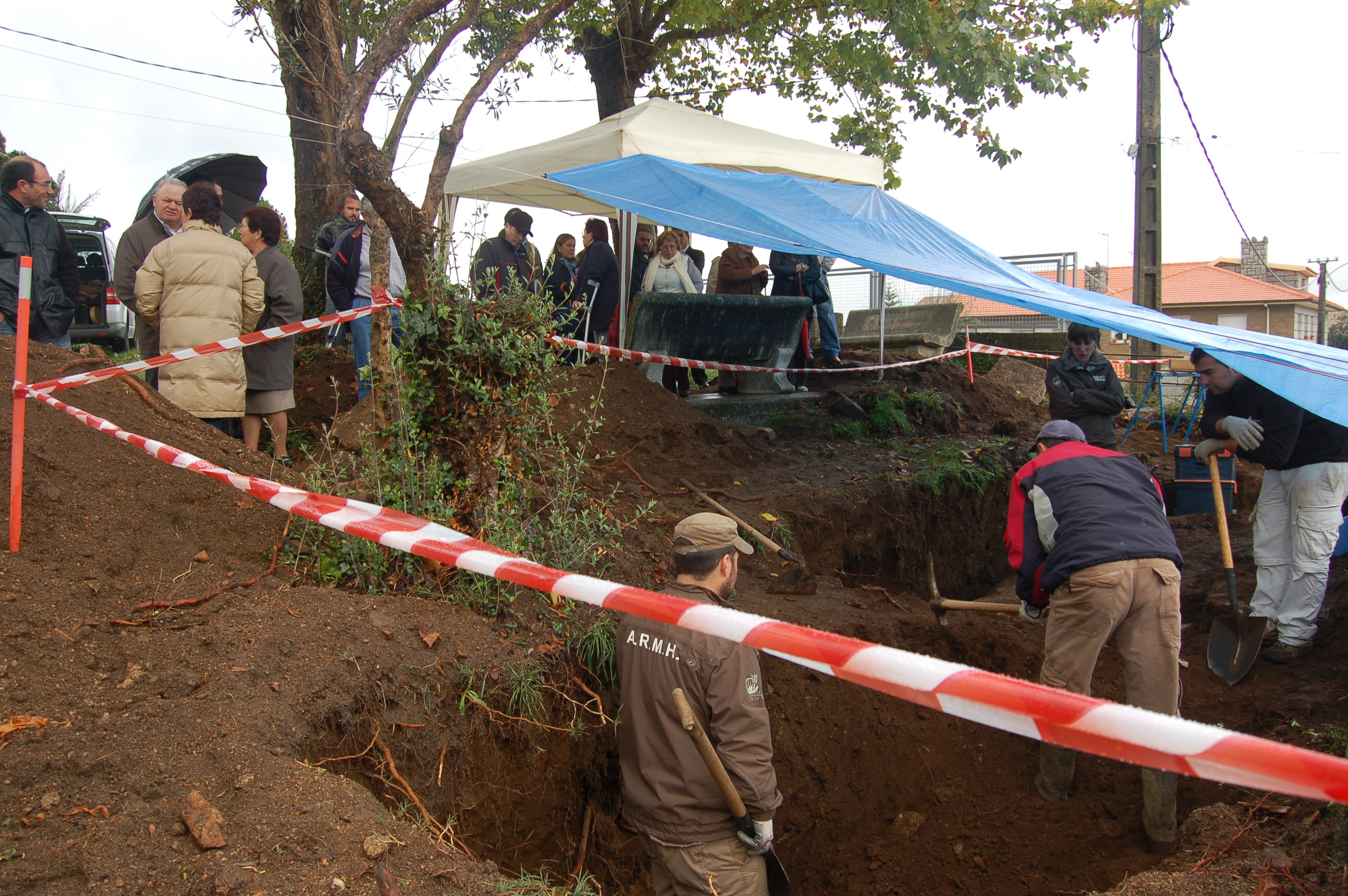 Escavación das foxas onde se soterrou ao xornalista Ramón Barreiro Rodríguez e ao electricista Castor Cordal Garrido, fusilados o 15 de setembro de 1936. Adro da igrexa parroquial de Curro (Barro). Á escavación, levada a cabo por voluntarios da Asociación pola recuperación da Memoria Histórica, asistiron familiares dos fusilados.